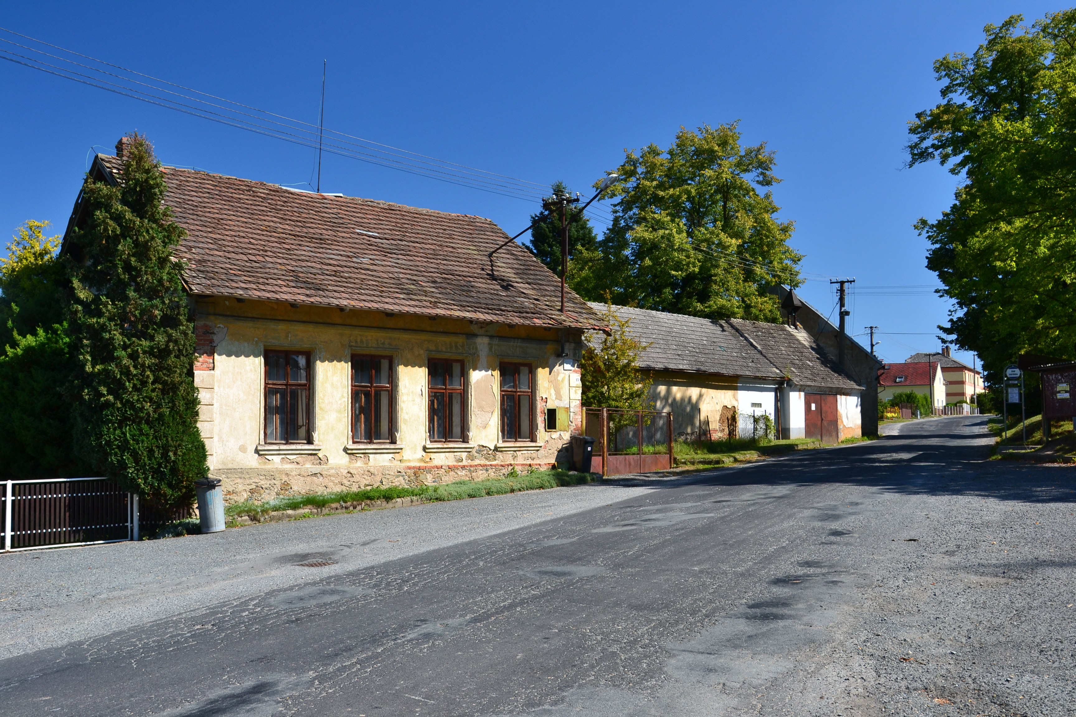 Hubenov - dům čp. 13 na návsi